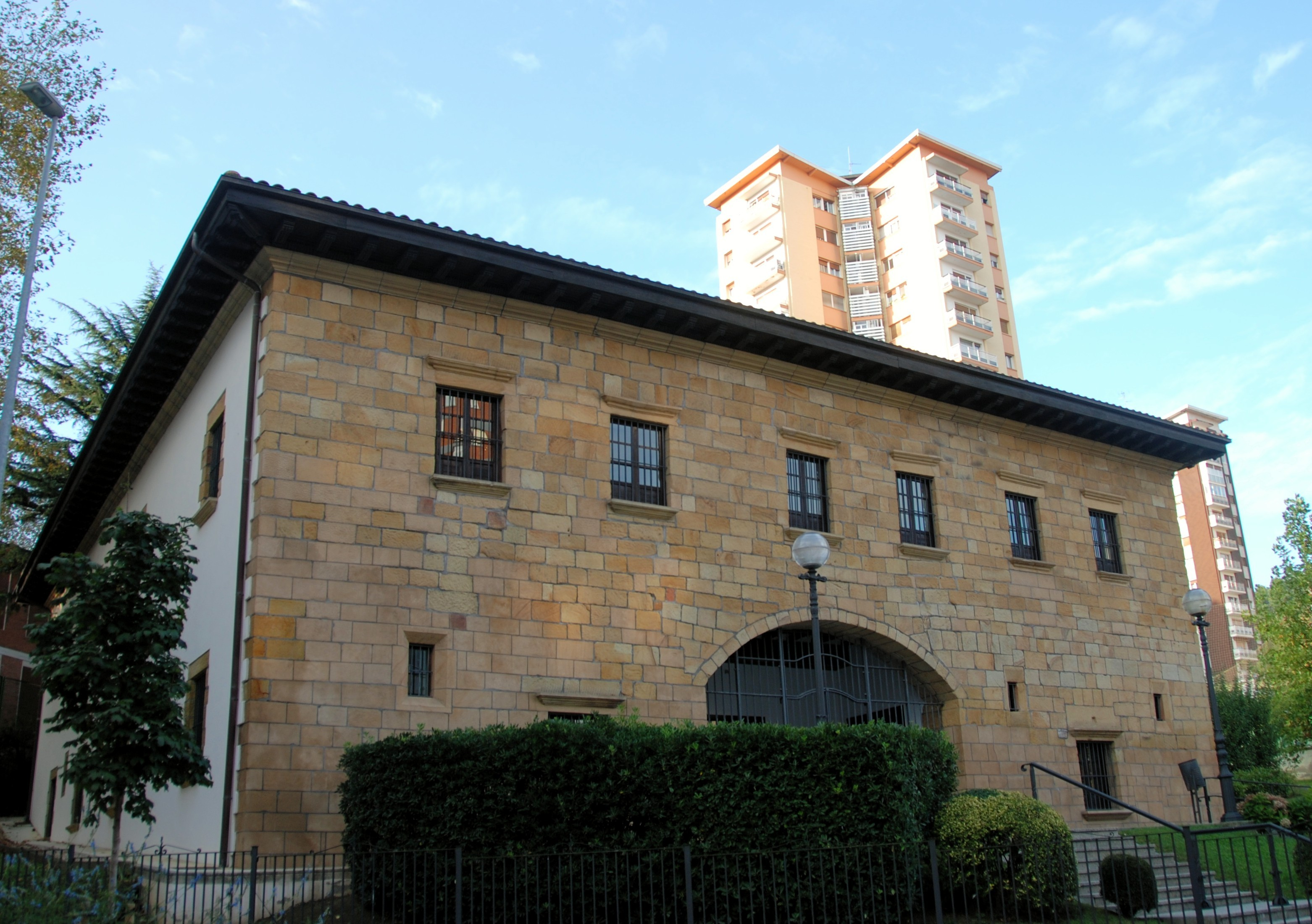 Moneda baserria. Donostia